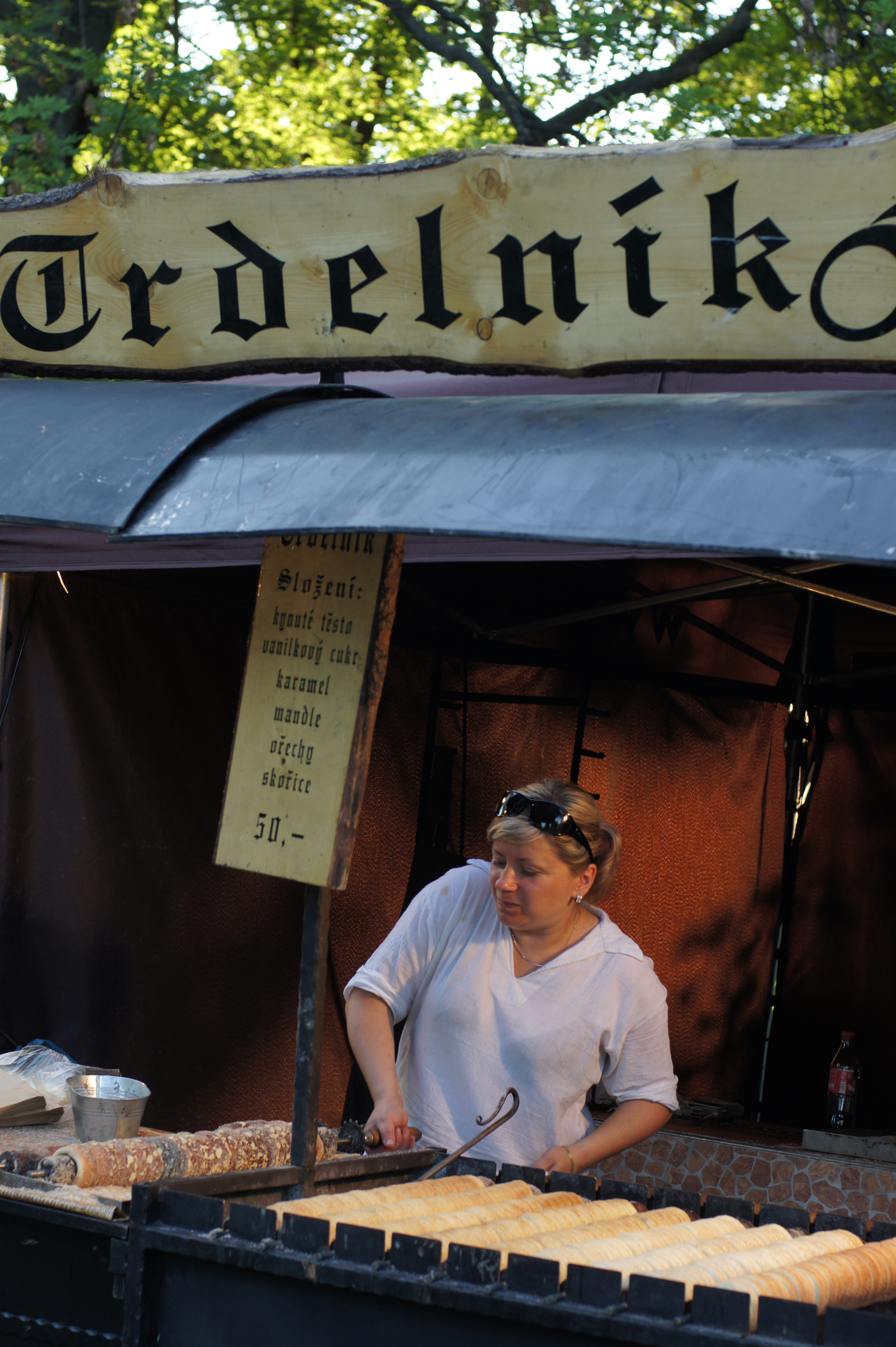 Marchande de trdelniks à Prague, République Tchèque